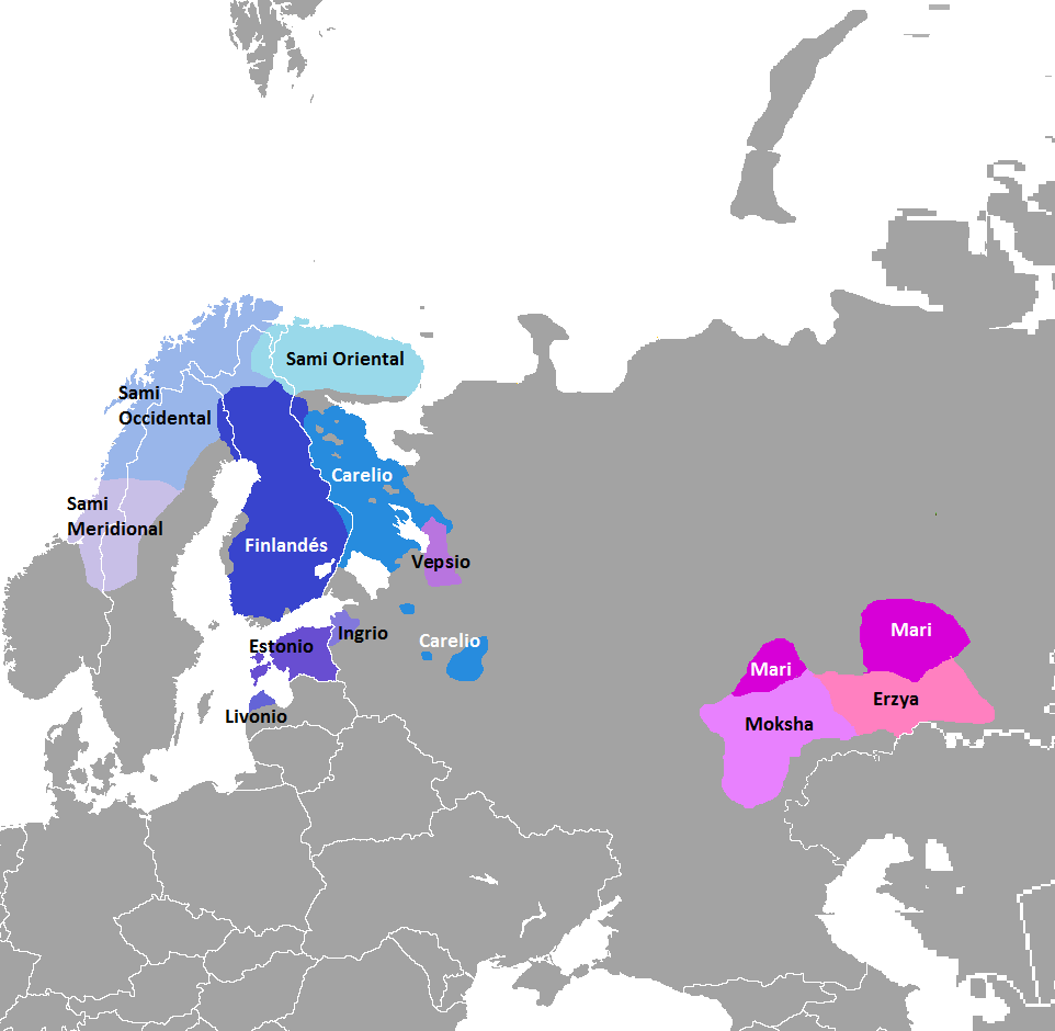 Lenguas finovolgaicas